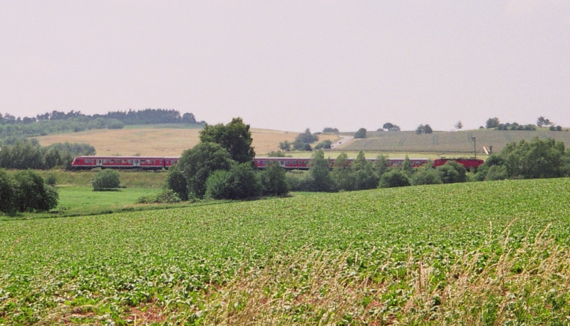 Regionalexpress Kassel-Halle an der ehemaligen innerdeutschen Grenze (hier entlang dem Bachlauf "Hottenbach" im Vordergrund ) zwischen Arenshausen und Eichenberg. Blick aus Richtung Hottenrode Süden; Links und hinten Thüringen mit "Almas Höhe" (ehemalige DDR, sowjetische Besatzungszone), vorne rechts vor dem Bachlauf Niedersachsen (BRD, britische Besatzungszone). Im Hintergrund die Bundesstraße 80 zwischen Hohengandern (Thüringen, links) und Witzenhausen (Hessen, hinten). Das Dreiländereck Thüringen/Hessen/Niedersachsen an den "Schmiedeköpfen" liegt rechts außerhalb des Bildausschnites. Der Zug fährt mit Steuerwagen voran. - Regional Train (eastbound, to the left) crossing the former border of the GDR (East Germany) near Eichenberg, Hesse, Germany.